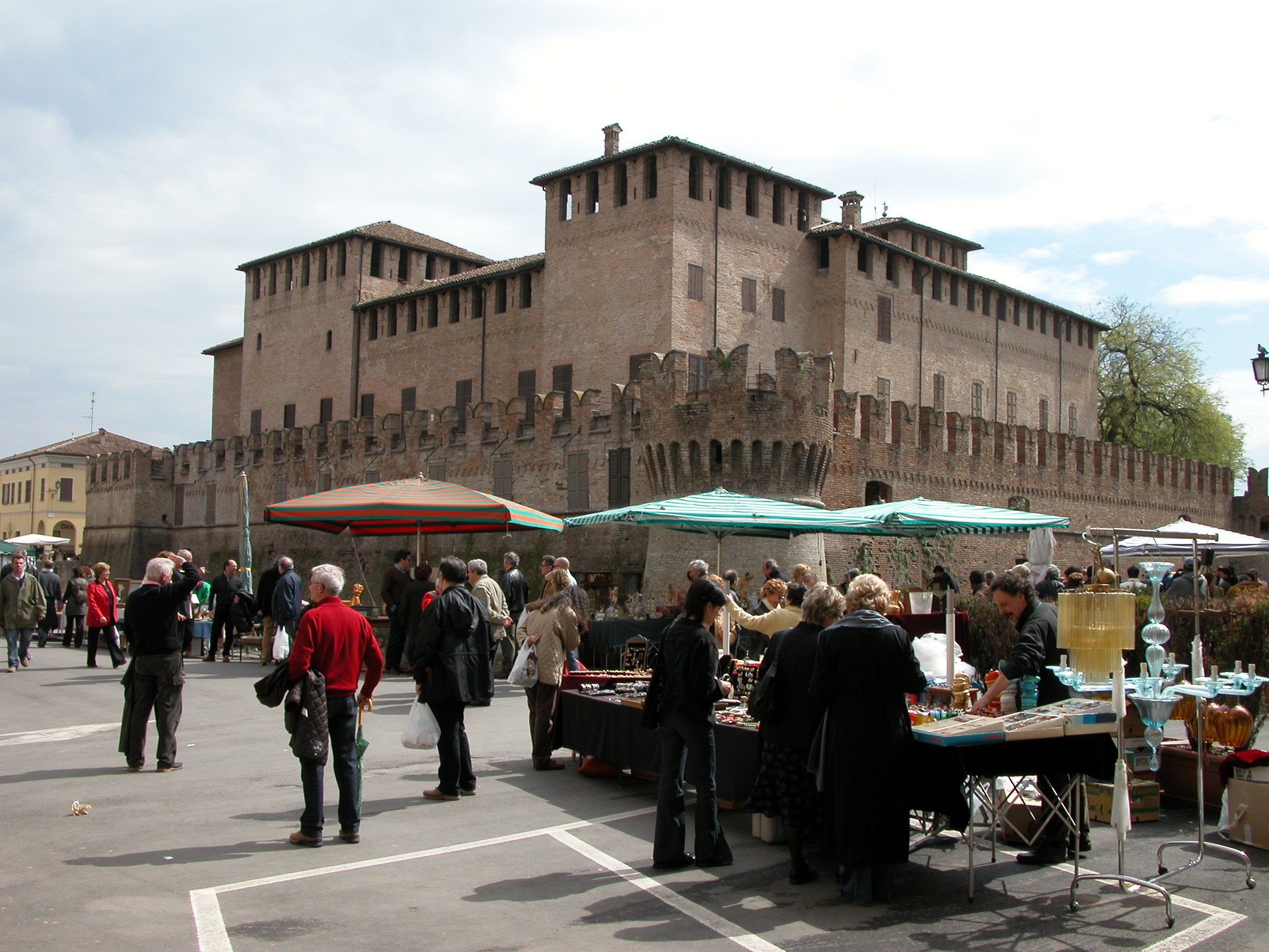 Fontanellato: Mercato Antiquario